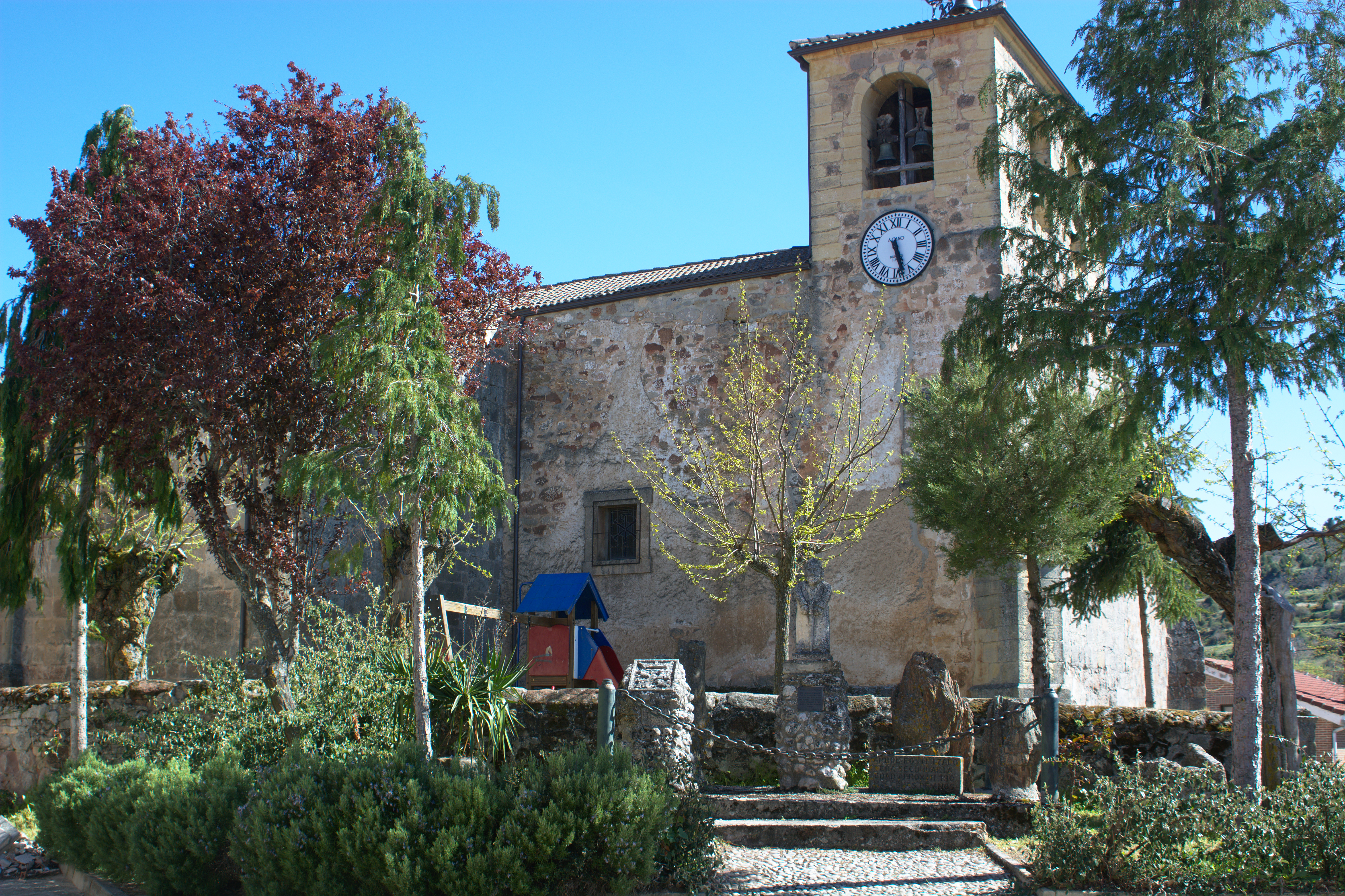 Iglesia de Nuestra Señora de la Asunción, en Contreras.